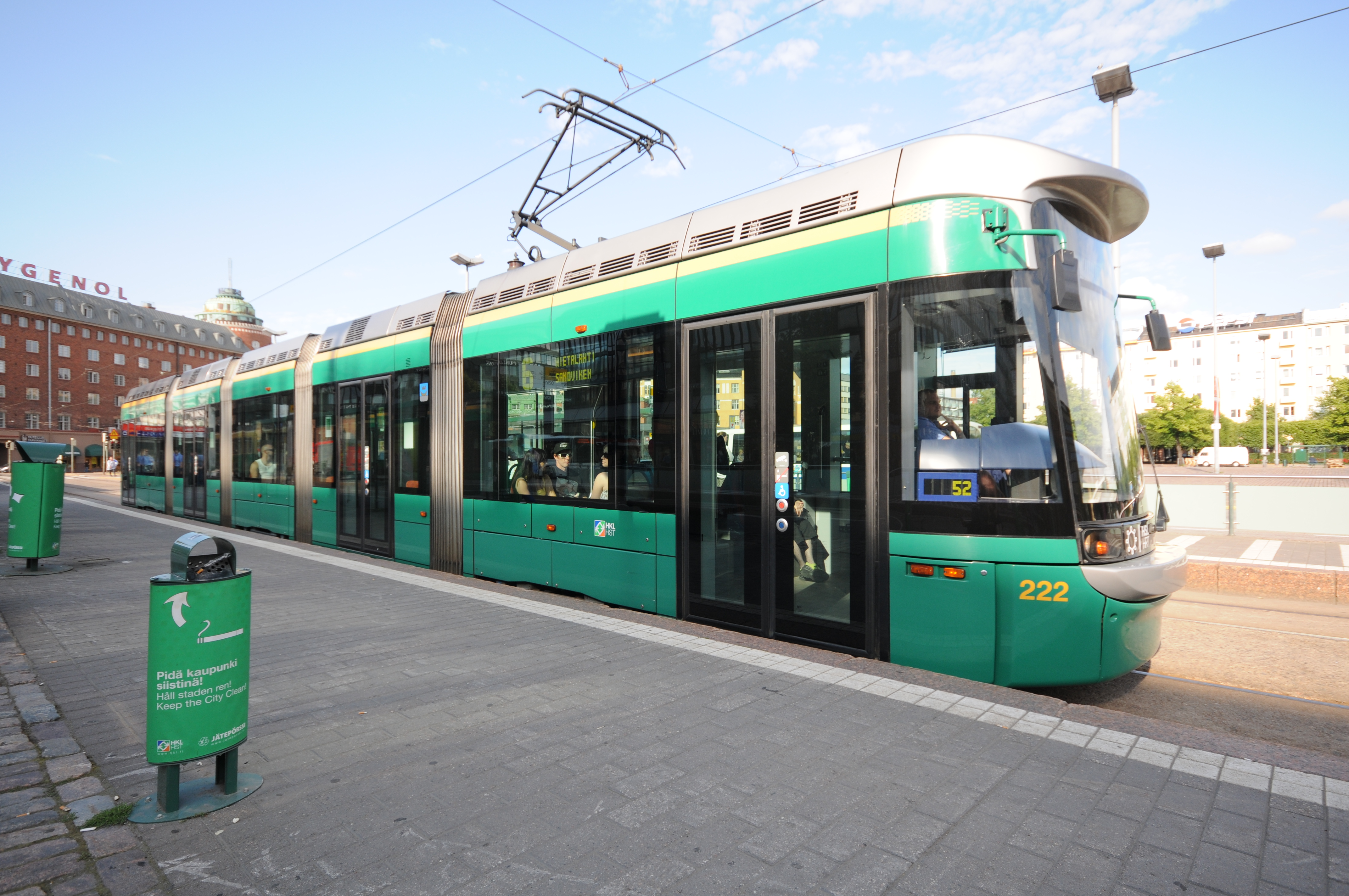 Helsinki